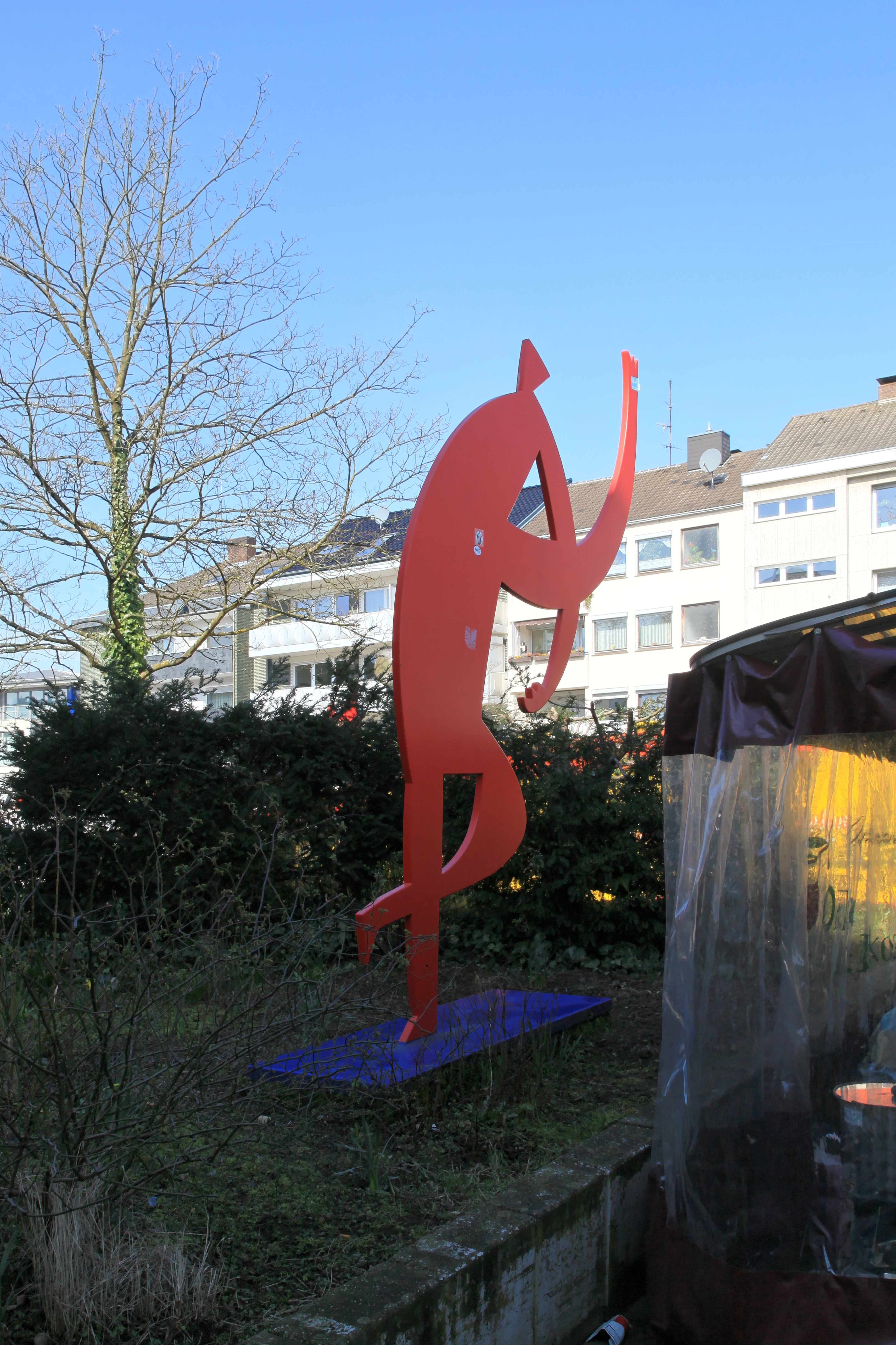 "Rote Figur für Haan" von Klaus Richter, Neuer Markt in Haan